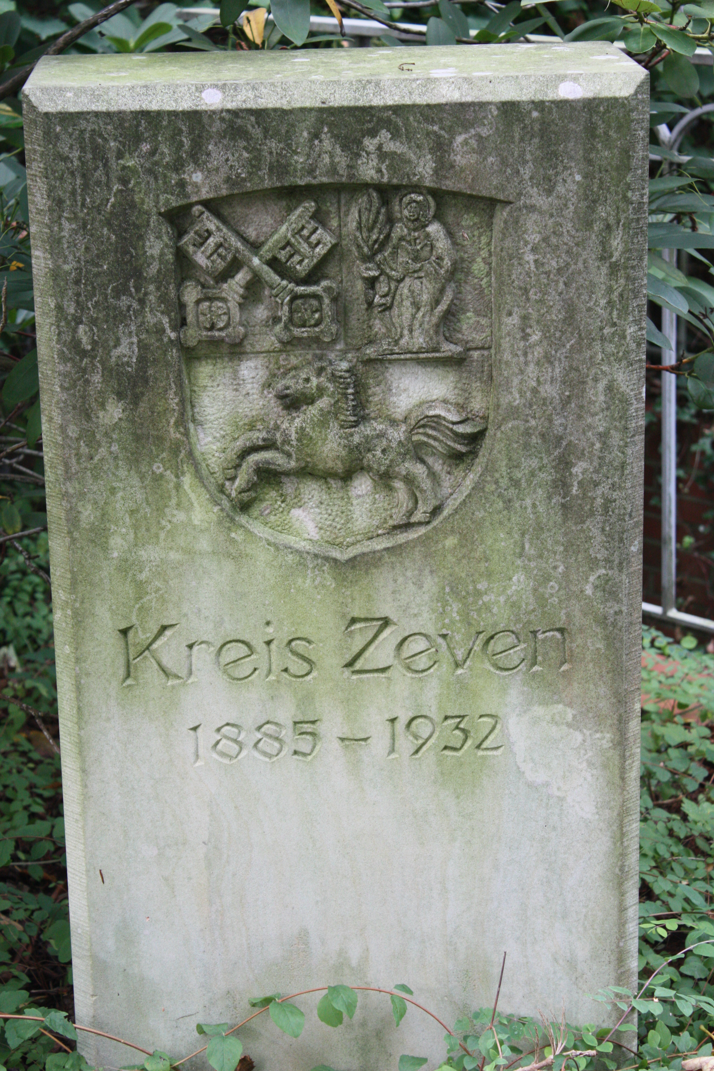 Kloster Zeven und St. Viti Kirche in Zeven